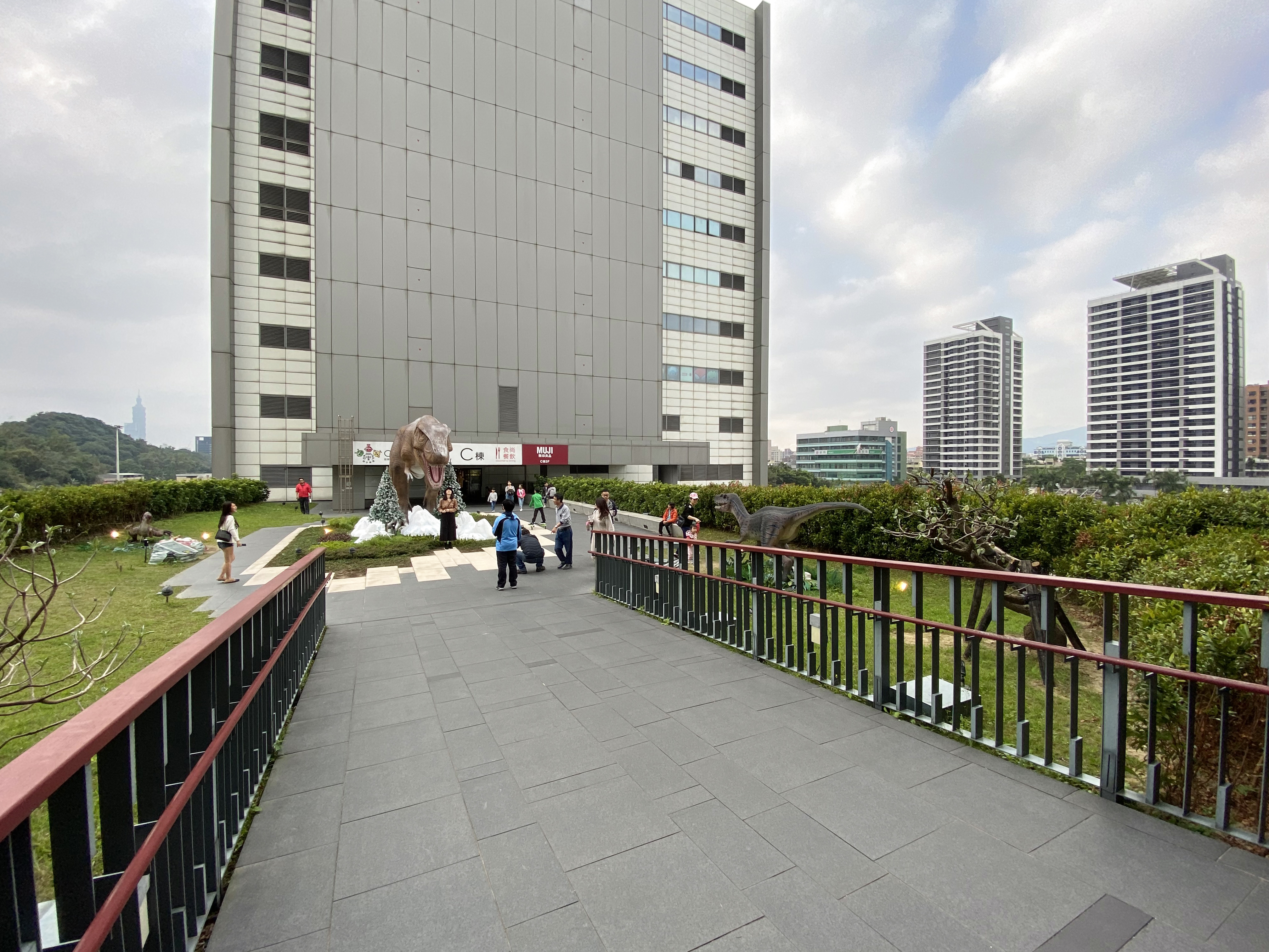 CITYLINK Nangang Level 3 podium